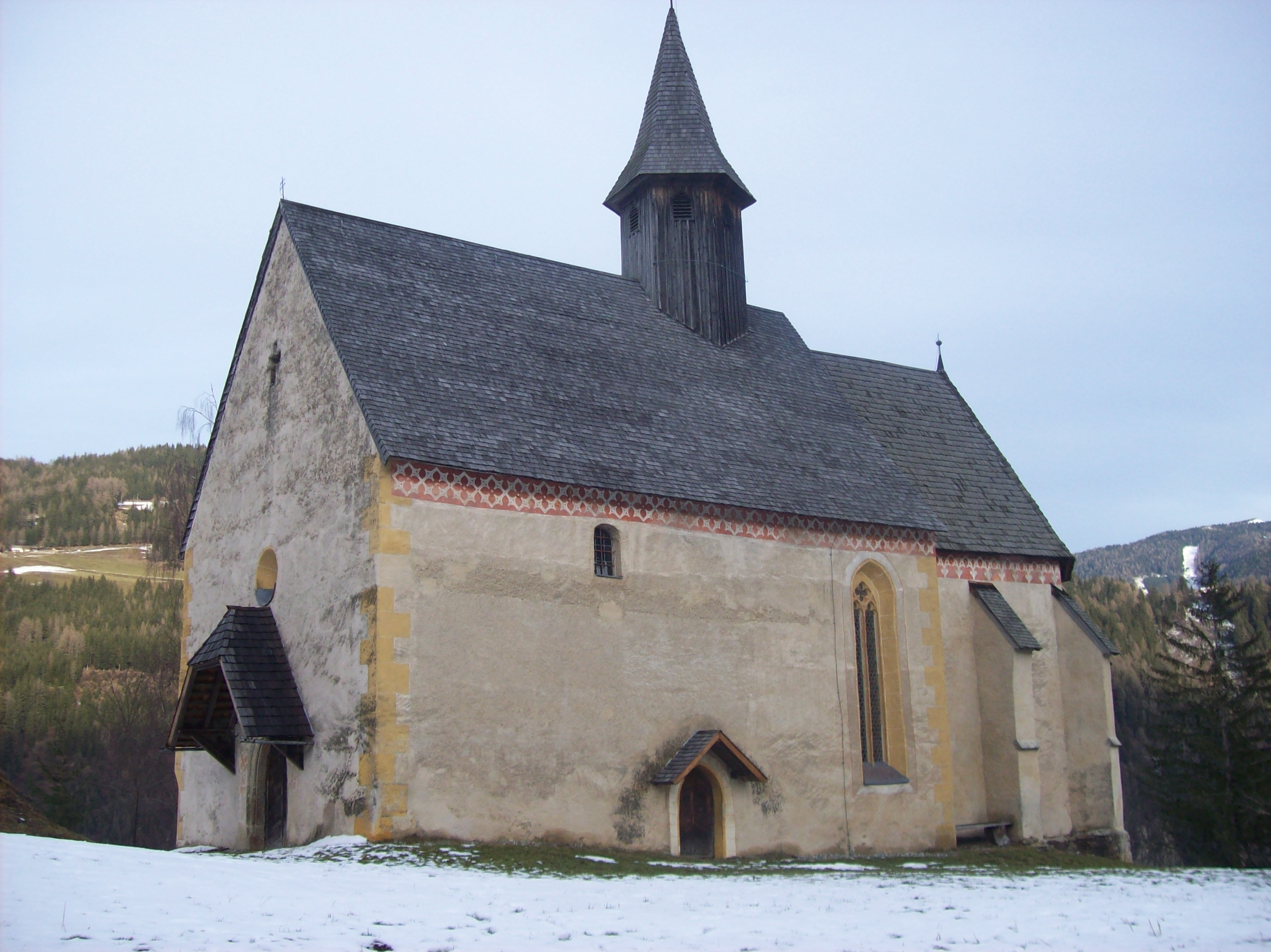 Kath. Filialkirche hl. Laurentius